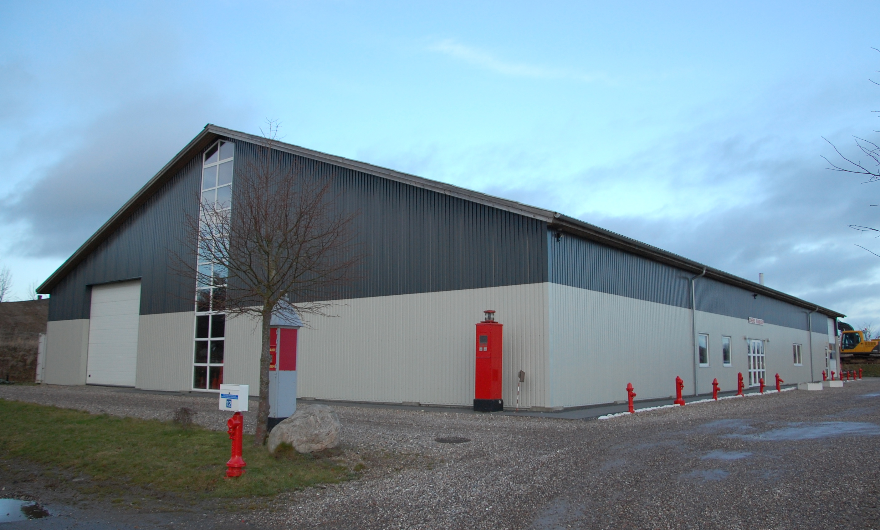 Feuerwehrmuseum Asnaes